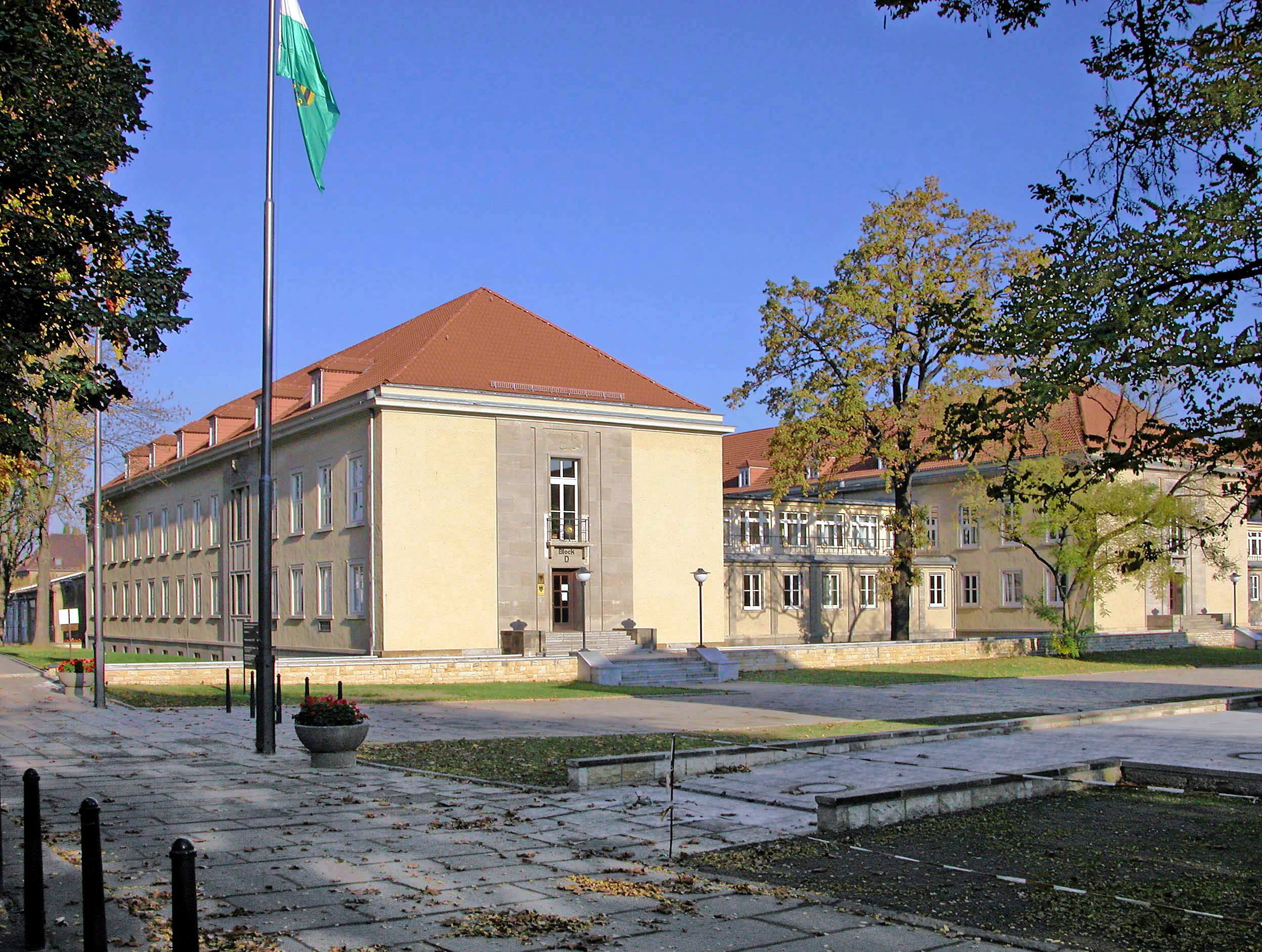 28.10.2006 01219 Dresden-Strehlen, August-Bebel-Straße 19 (GMP: 51.031458,13.754249): NS Luftgaukommando, erbaut 1936-1938 nach Entwürfen von Wilhelm Kreis, damals Professor für Baukunst an der Dresdner Kunstakademie. In der DDR-Zeit war hier die Militärakademie Friedrich Engels. Nach der Wende Bundeswehr-Verwaltungszentrum. [DSCN12332.TIF]20061028060DR.JPG(c)Blobelt